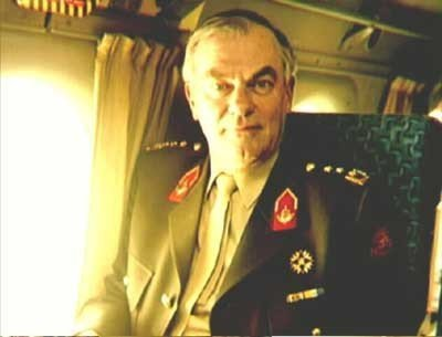 Luitenant-generaal J.P. (Hans) Verheijen, inspecteur-generaal der krijgsmacht, in een Fokker F-27.